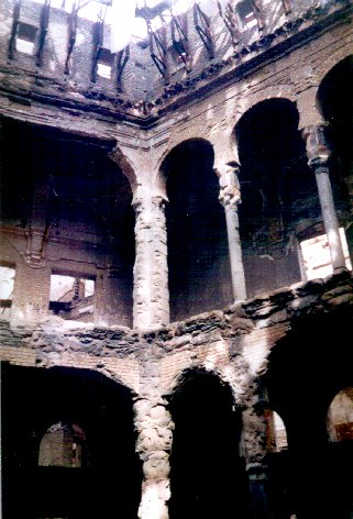 Sarajevo-bibliotheek, sept. 1996